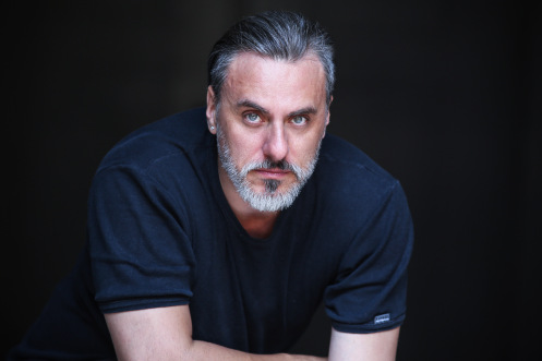 Max Vado, attore italiano